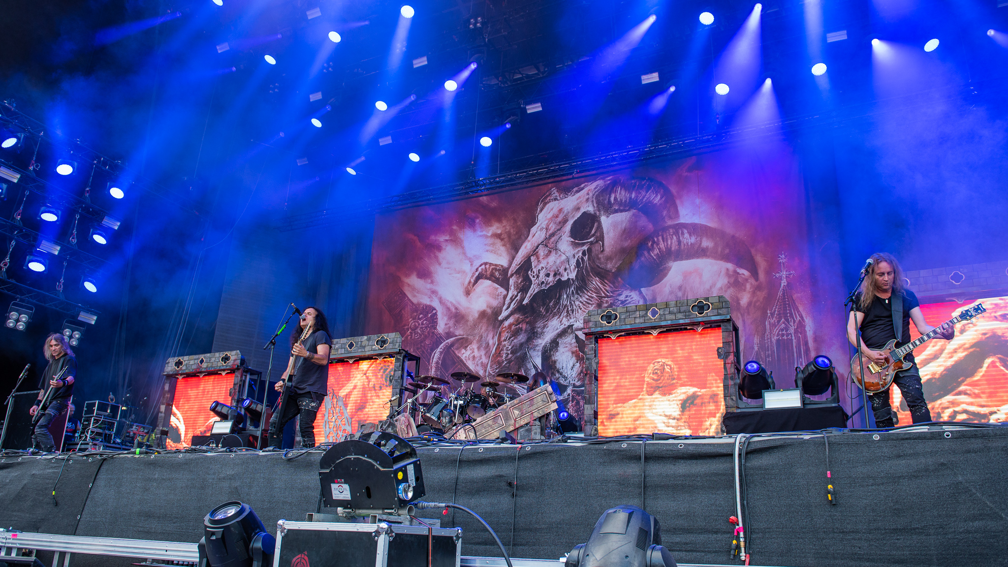 ARGO-Konzerte,Beck's Park Stage,Christian „Speesy“ Giesler,Festival,Konzert,Kreator,Livekonzert,Livemusik,Mille Petrozza,Musik,RiP,Rock im Park 2018,Sami Yli-Sirniö